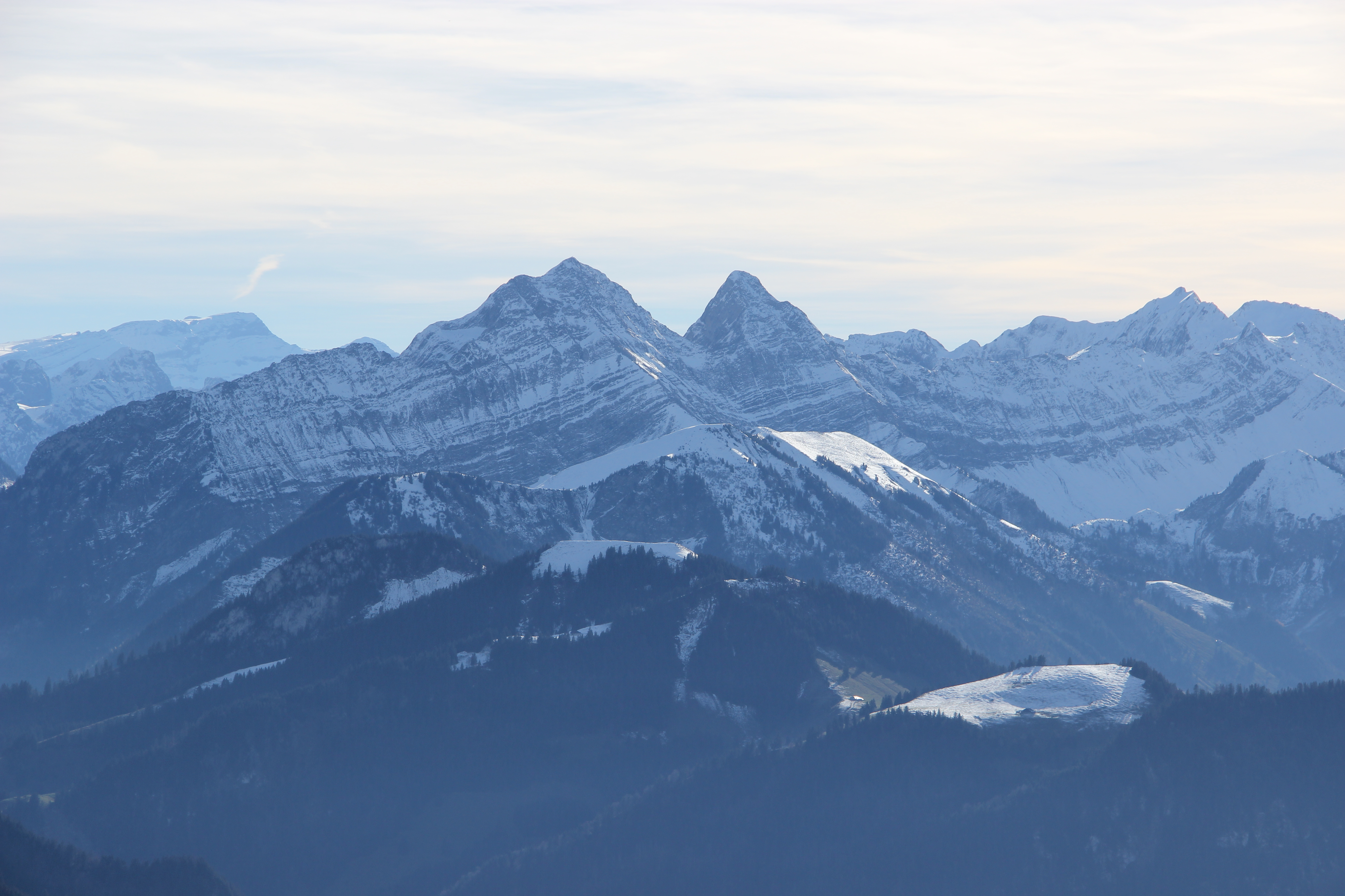 Dent de Brenleire and Dent de Follieran